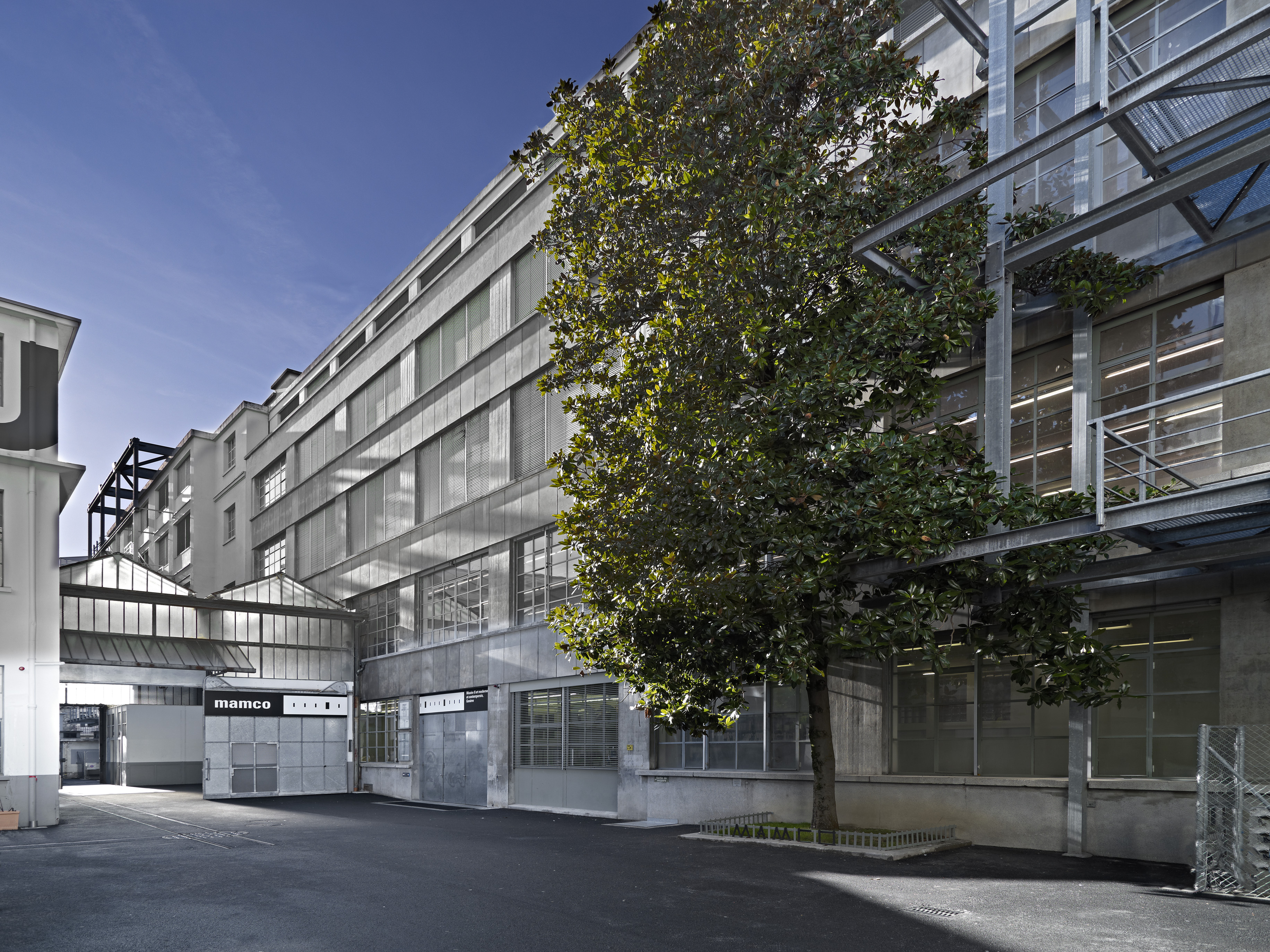 Photo à lextérieur du bâtiment hébergeant le Musée d'art moderne et contemporain (MAMCO)